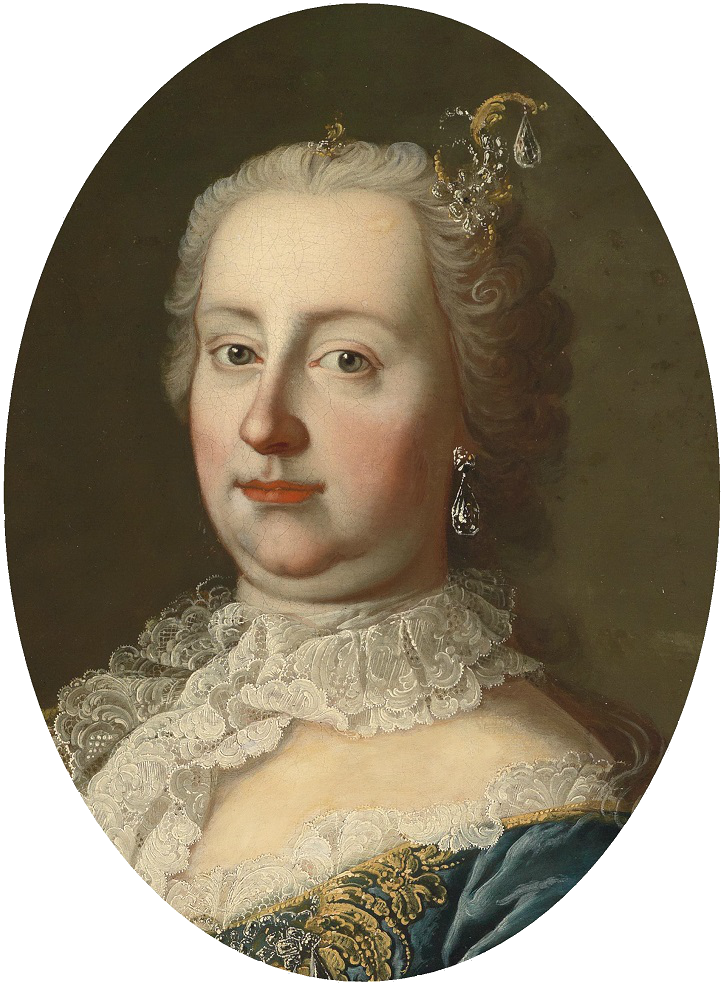 Bildnis der Kaiserin Maria Theresia. Provenienz: aus österreichischem Adelsbesitz.